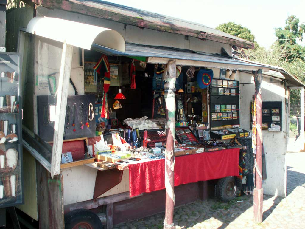 Salgsvogn på Pusherstreet på Chrisitiania